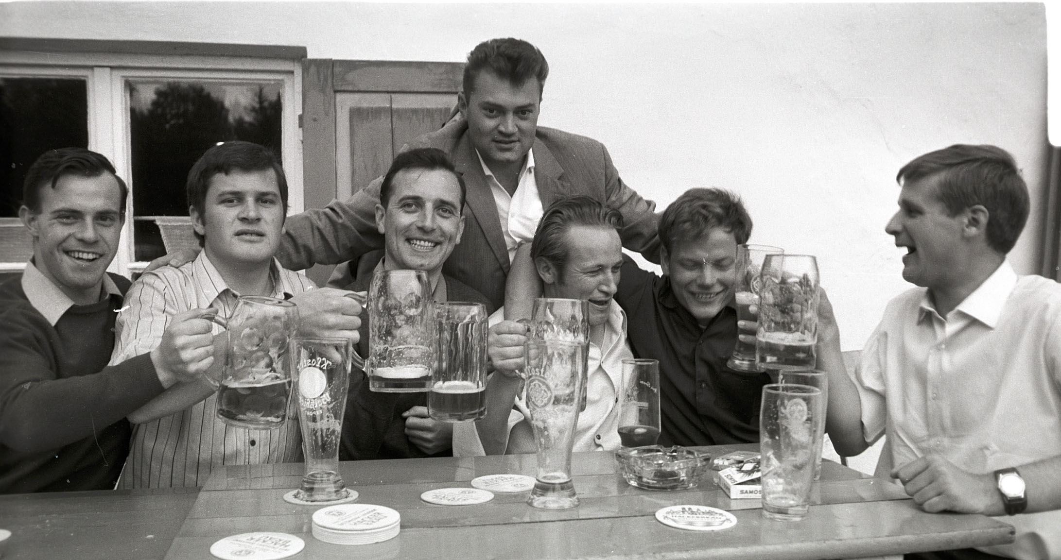 Lehrer und Schüler der Abiturklassen 1969/1970 des humanistischen Gymnasiums in Wolfratshausen-Waldram